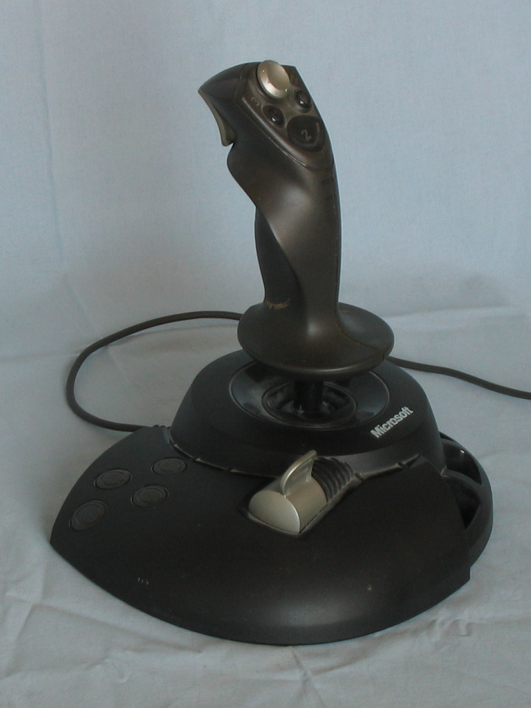 ジョイスティック。.